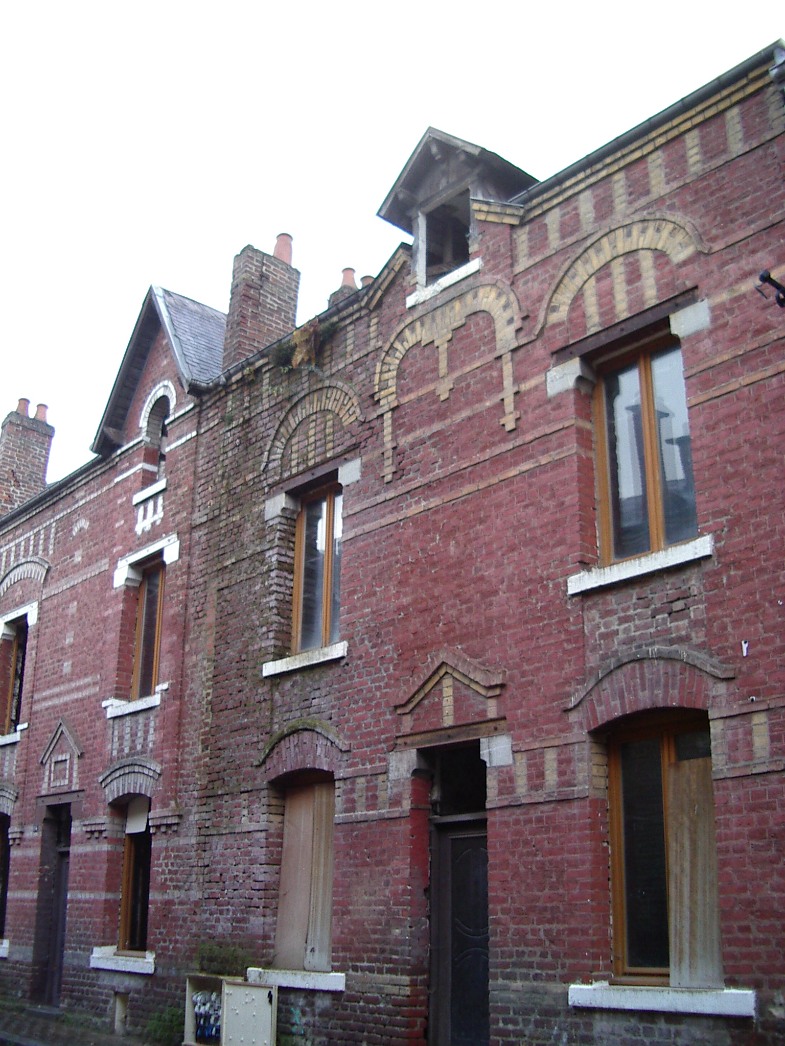 La cité Paris-Campagne est une ancienne cité ouvrière, située à Revin, en Ardennes. C'est aujourd'hui un ensemble bâti inscrit aux monuments historiques.